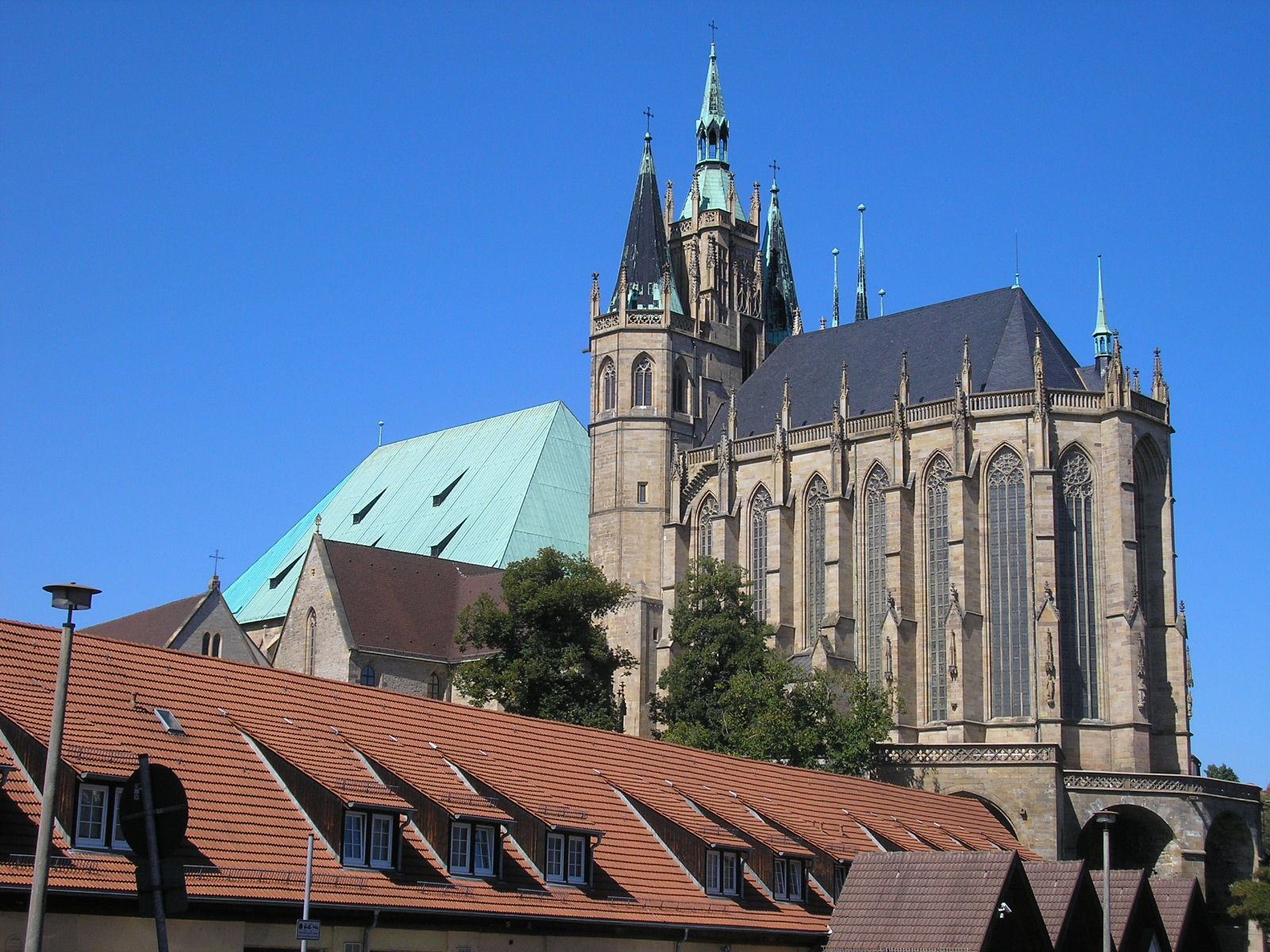 Der Erfurter Dom von Süden betrachtet.